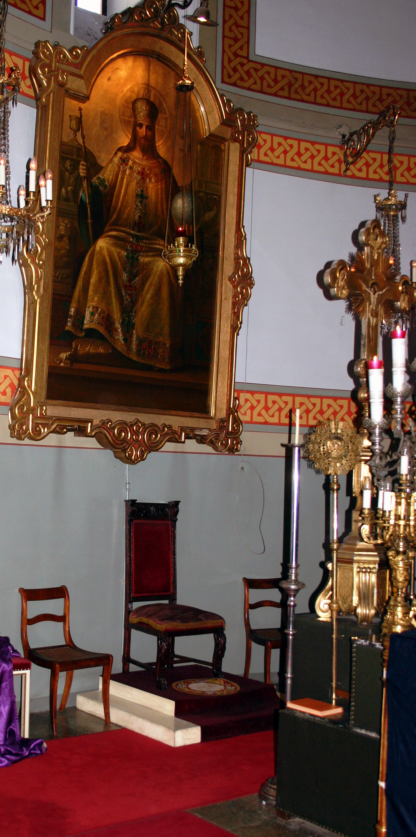 Piispanistuin Uspenskin katedraalissa